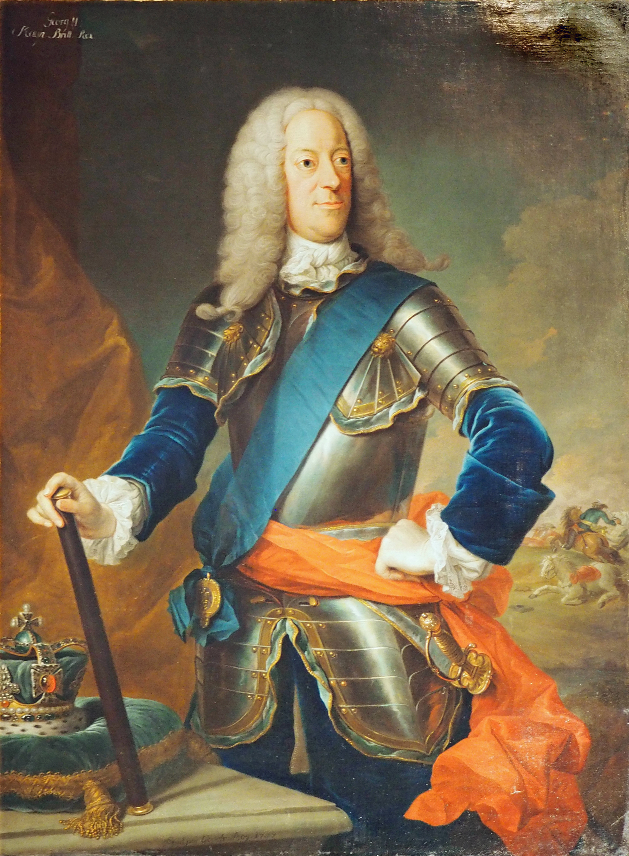 Georg II. (1683-1760), Kurfürst von Hannover, König von Großbritannien und Irland